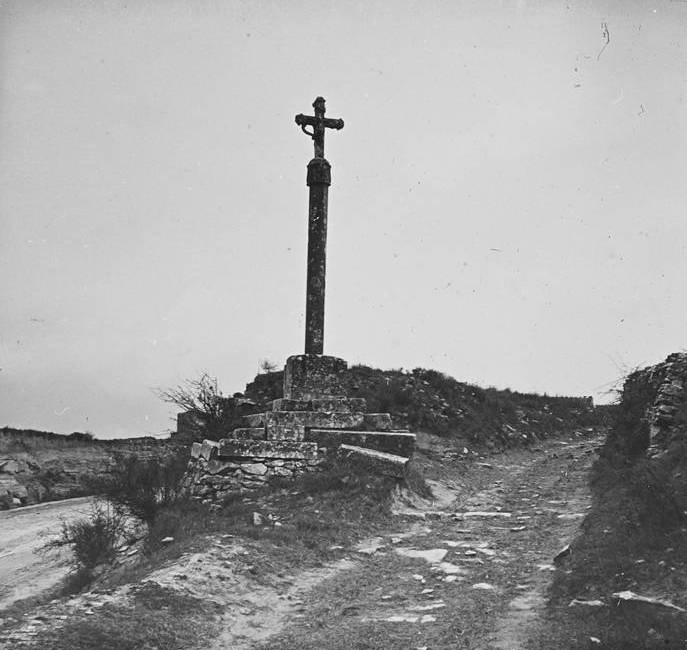 Creu del Belltall. Joan Roig i Font (1913)